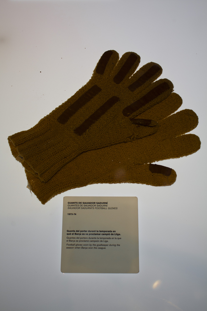 Guantes de Salvador Sadurní de la temporada 1973-74, expuestos en el museo del FC Barcelona.